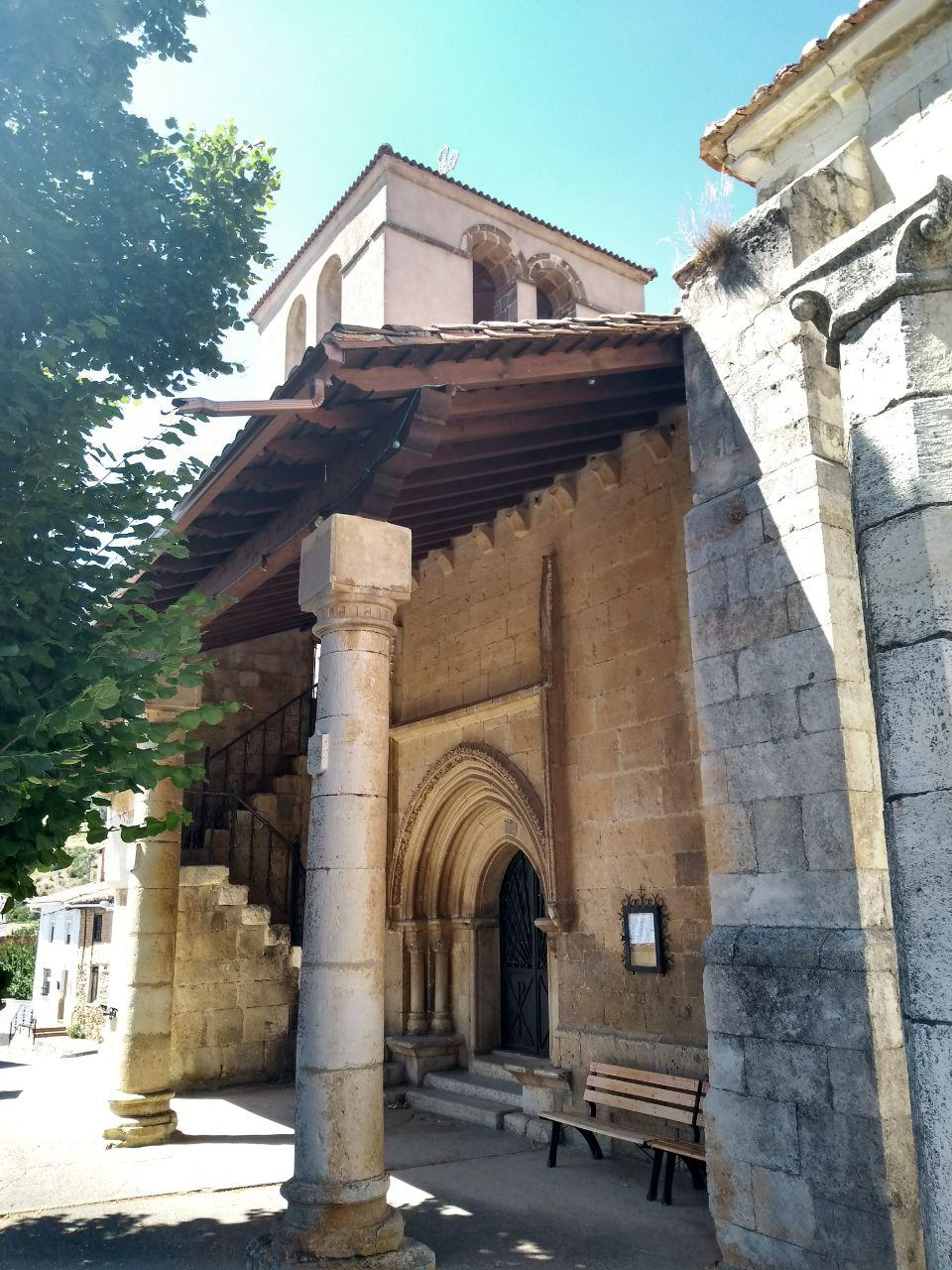 Iglesia de Nuestra Señora de las Candelas, Villaverde de la Peña, provincia de Palencia, España. Portada gótica (S. XV).